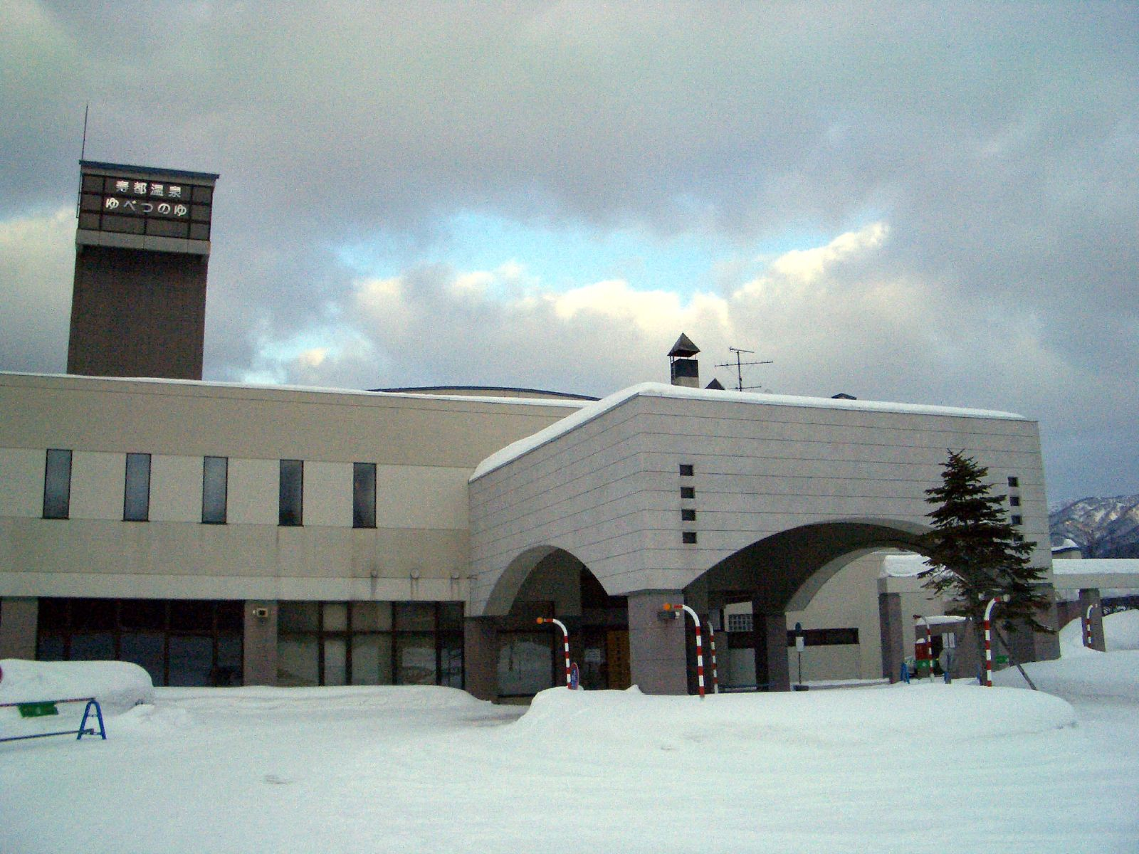 寿都温泉ゆべつのゆ